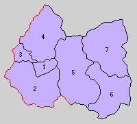 兵庫県出石郡の町村制時点の町村。